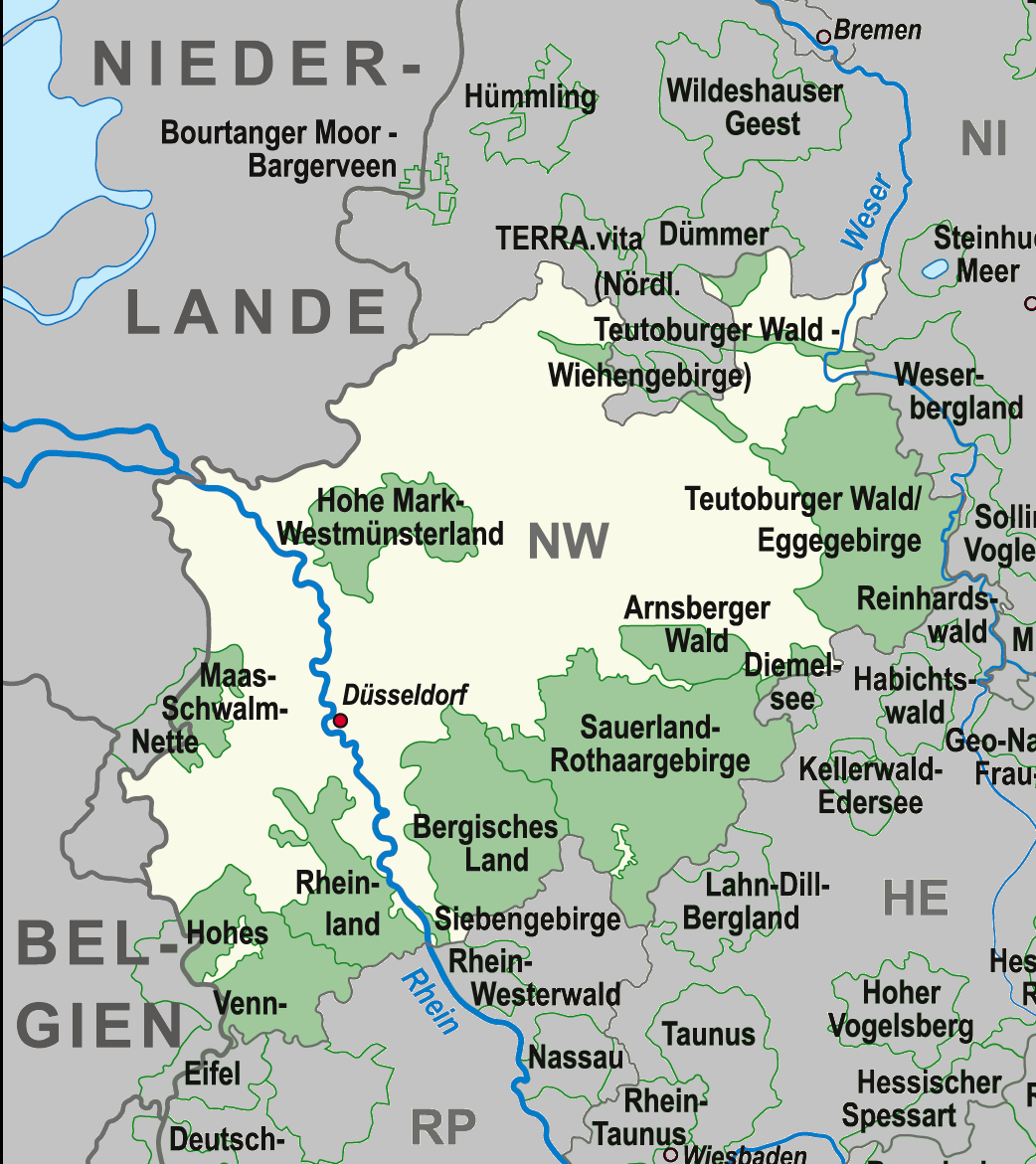 Karte Naturparks Deutschland Nordrhein-Westfalen